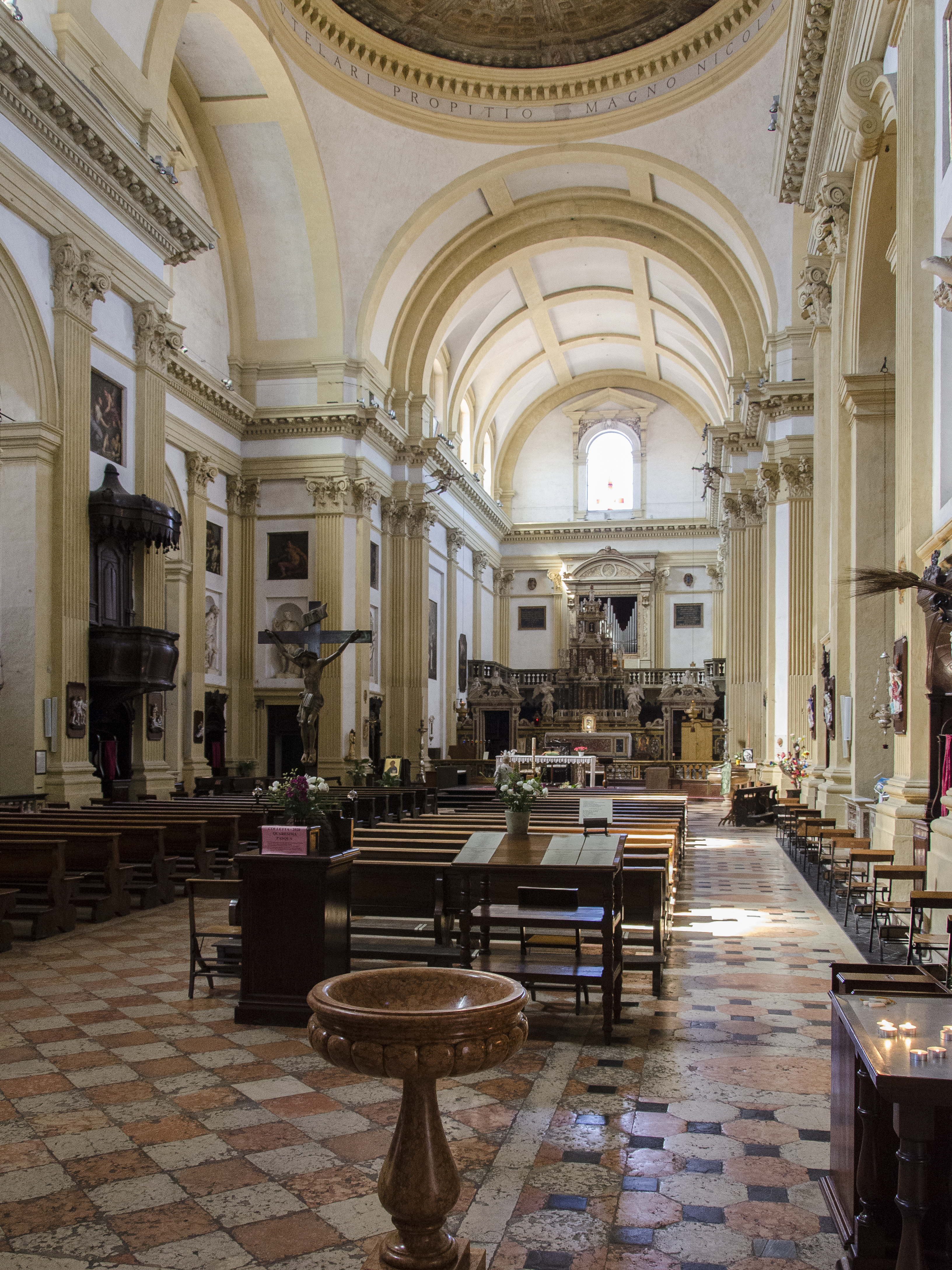 Chiesa di San Nicolò all'Arena, Verona.